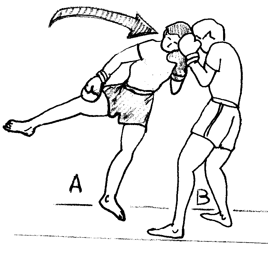 tête2.jpg